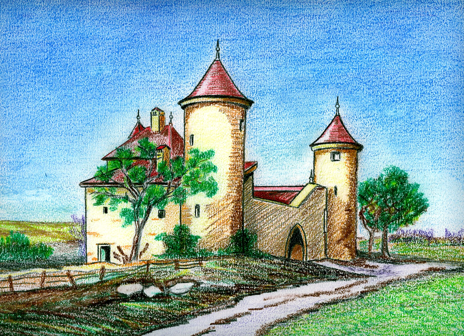 Château d'Etrembières, dessin au crayon gras